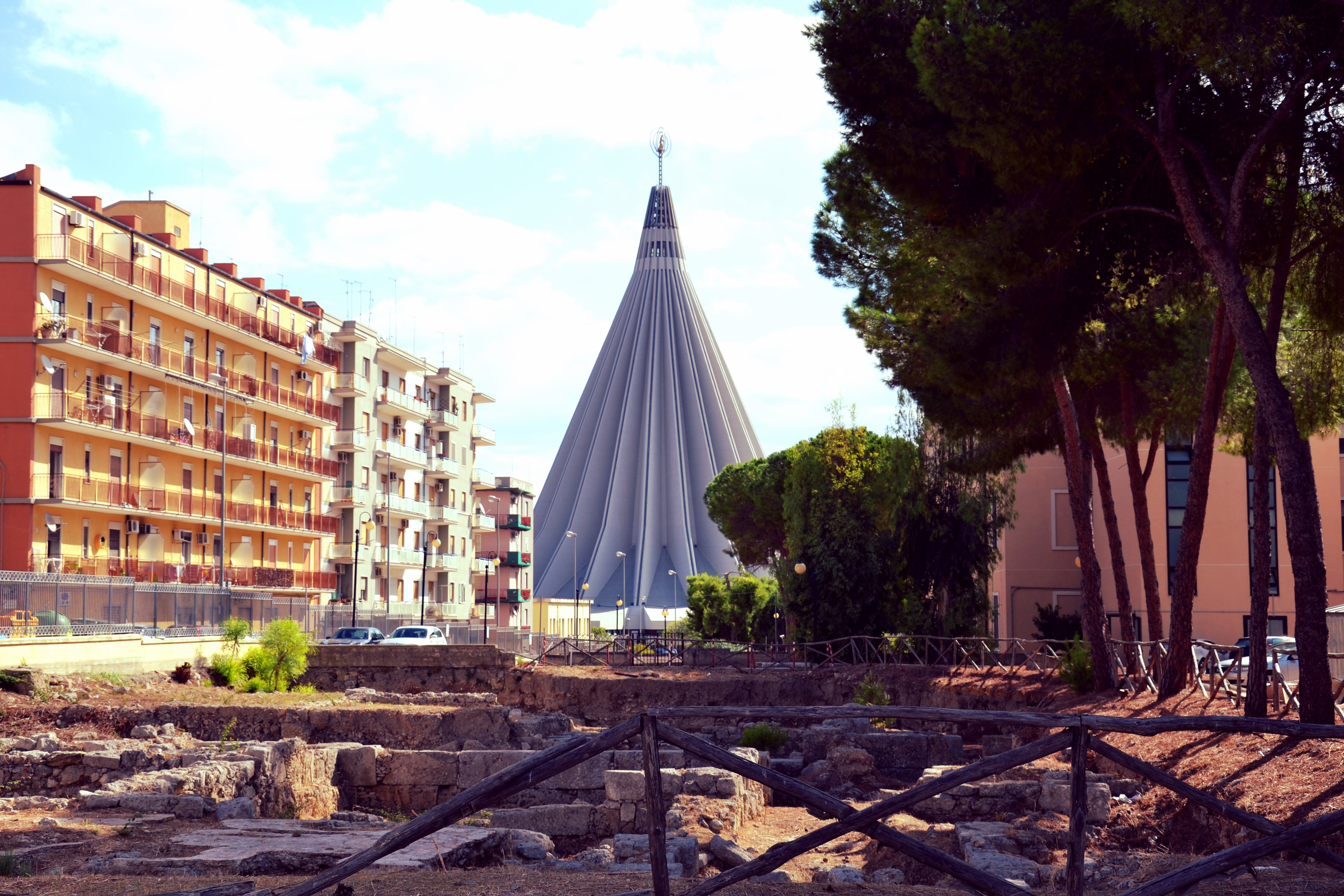 Syracuse, Sicile, Sanctuaire Notre Dame des larmes - Siracusa, Sicilia